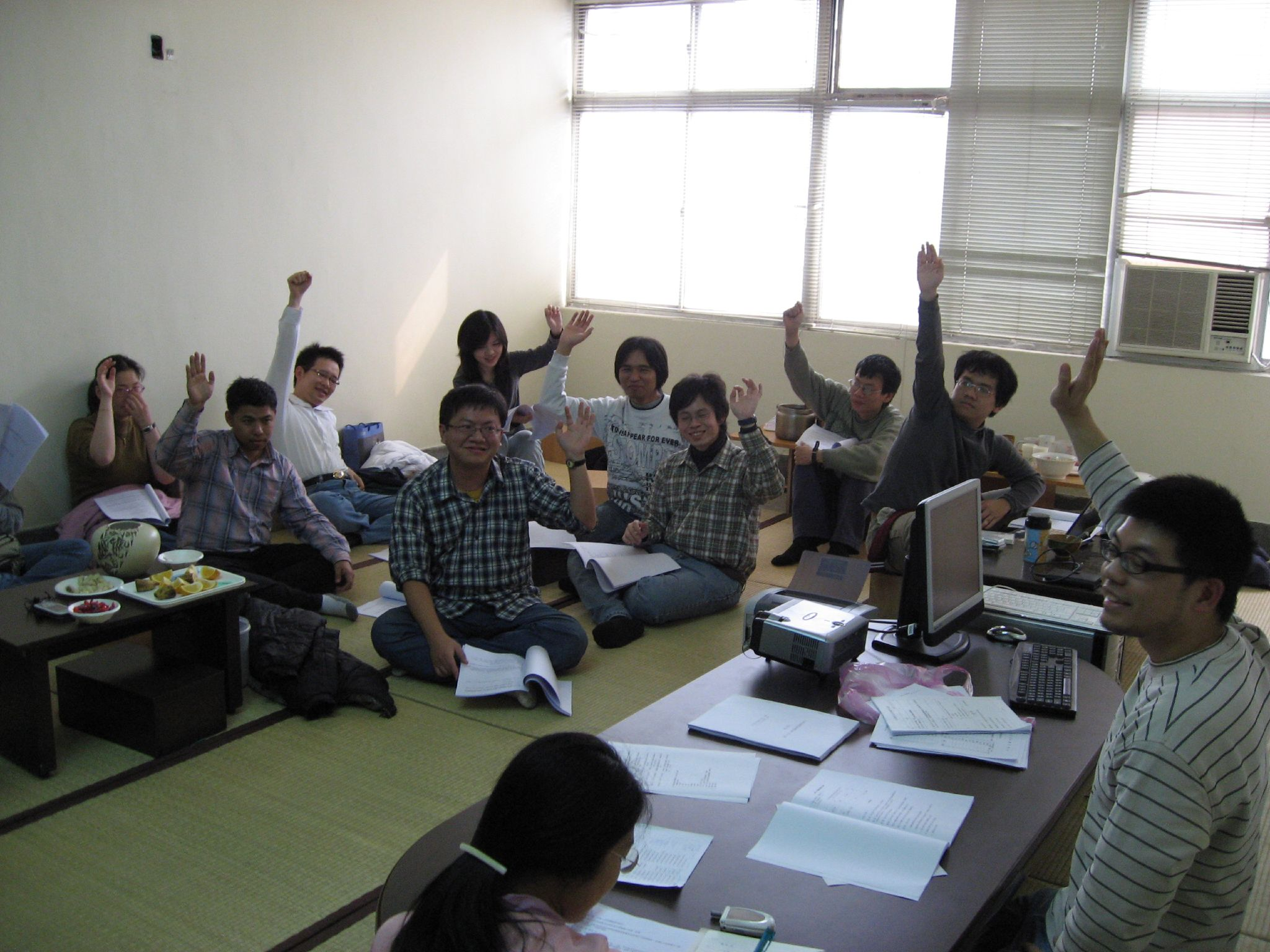 開會情景五